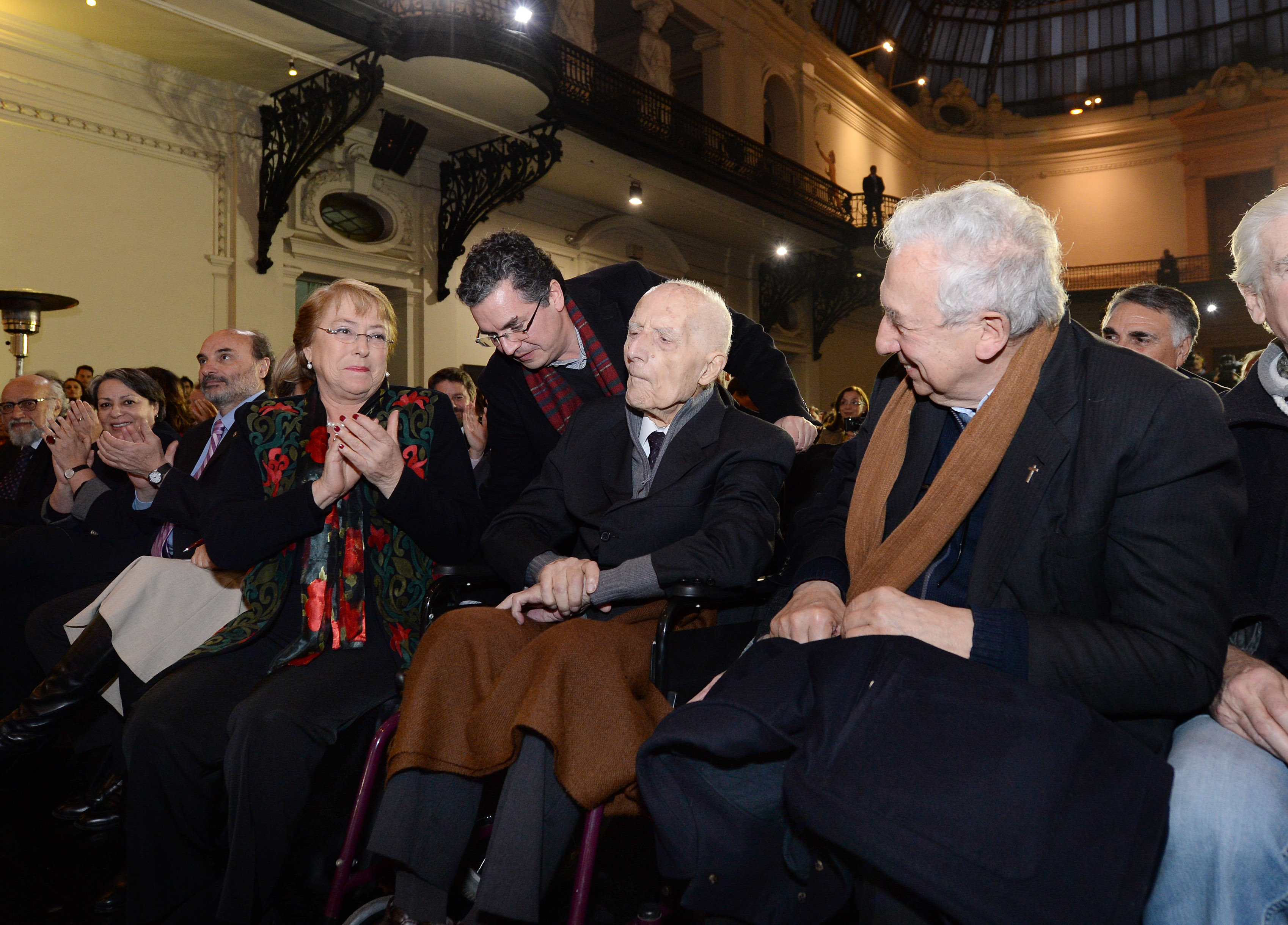 Gobierno de Chile